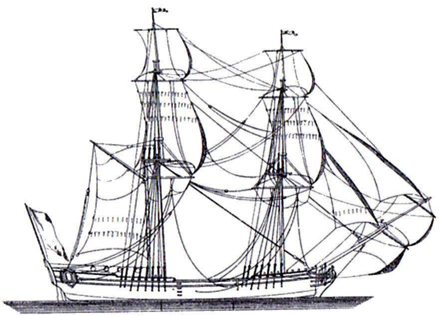 Schnau-Takelage, engl.: snow-rigging "Architectura Navalis Mercatoria", 1768, Druckplatte LXII Autor: Fredrik Henrik af Chapman Copyright: Das Buch wurde 1768 veröffentlicht. Der Autor ist seit 1808 tot. Sein Copyright besteht nicht mehr.